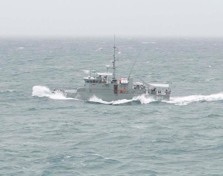 RFNS Kikau south of Fiji VIRIN = 181017-N-VG727-2016